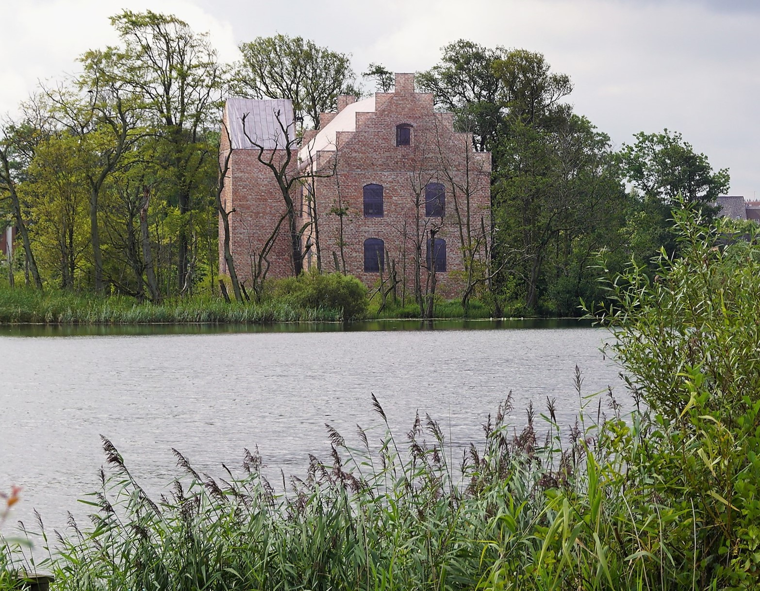 Visualisering af Silkeborg Slot 2017 set fra nord